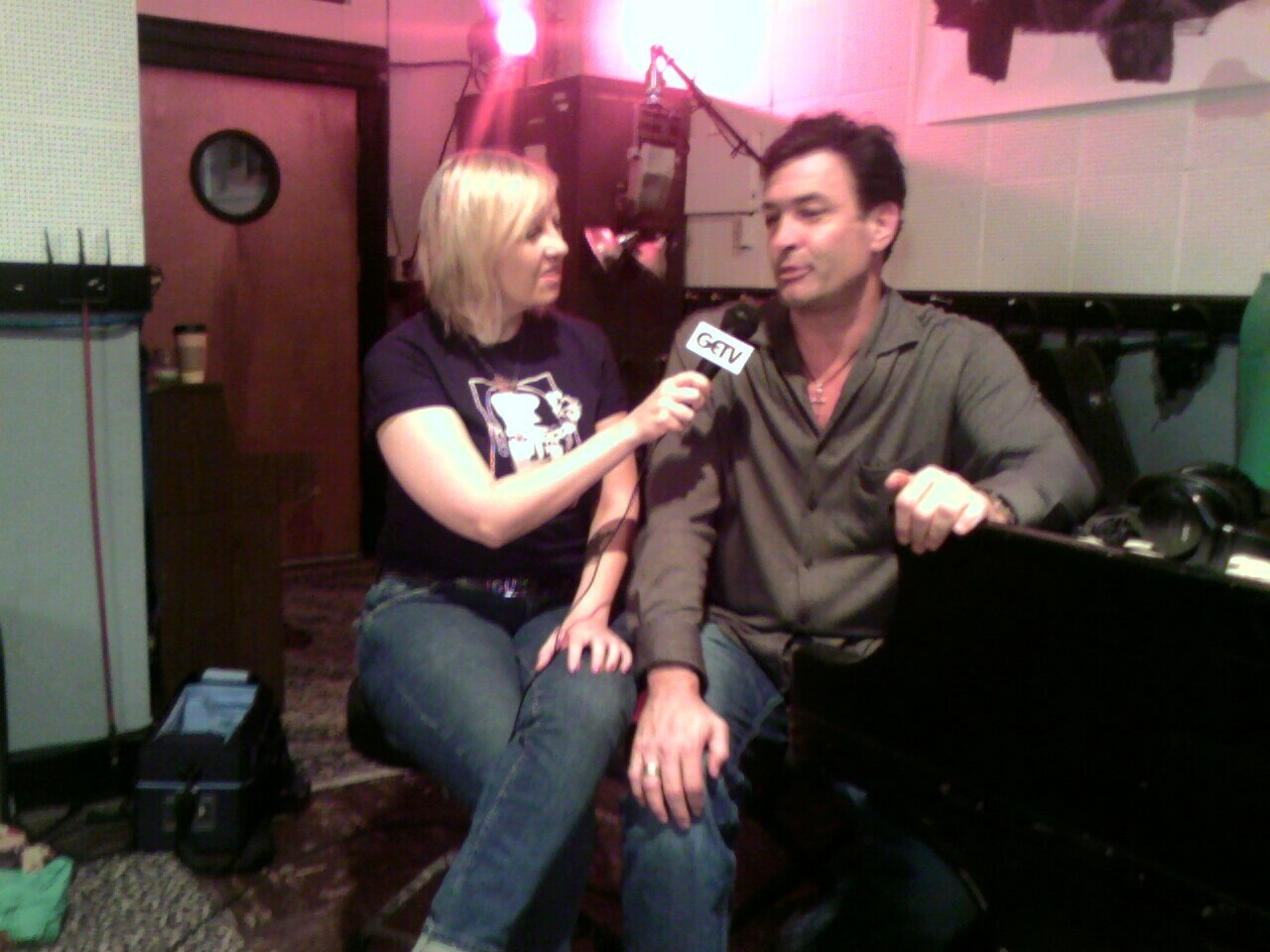 photo by ekai